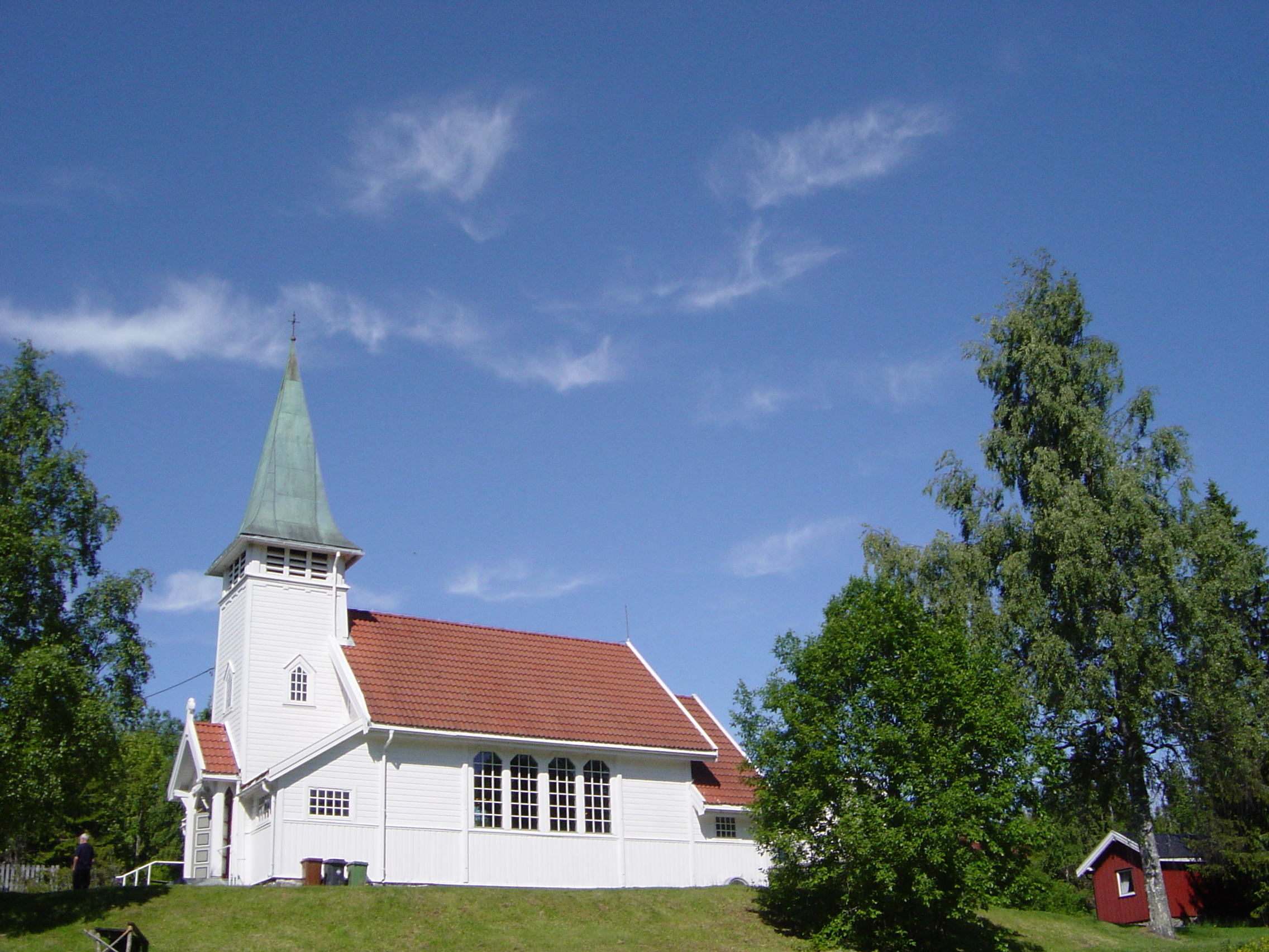 Sollihøgda kapell